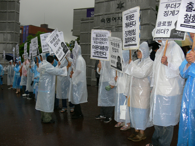 숙명여자대학교 백주년 기념 행사가 시작되기 전에 고려대학교에서 출교된 학생들의 복학을 요구하는 사람들이 어윤대 고려대 총장에 항의하는 시위를 하고 있다.